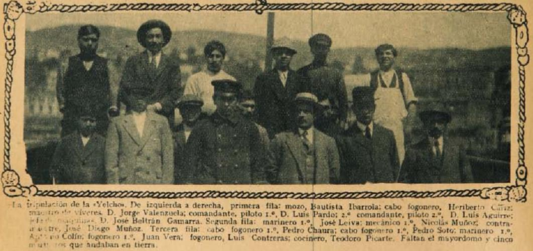 Tripulación del Escampavía Yelcho de la Armada de Chile que se hizo famoso por el rescate de los sobrevivientes de la malograda expedición Shackleton en 1916. La unidad estaba comandada por el Piloto Pardo.